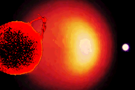 source